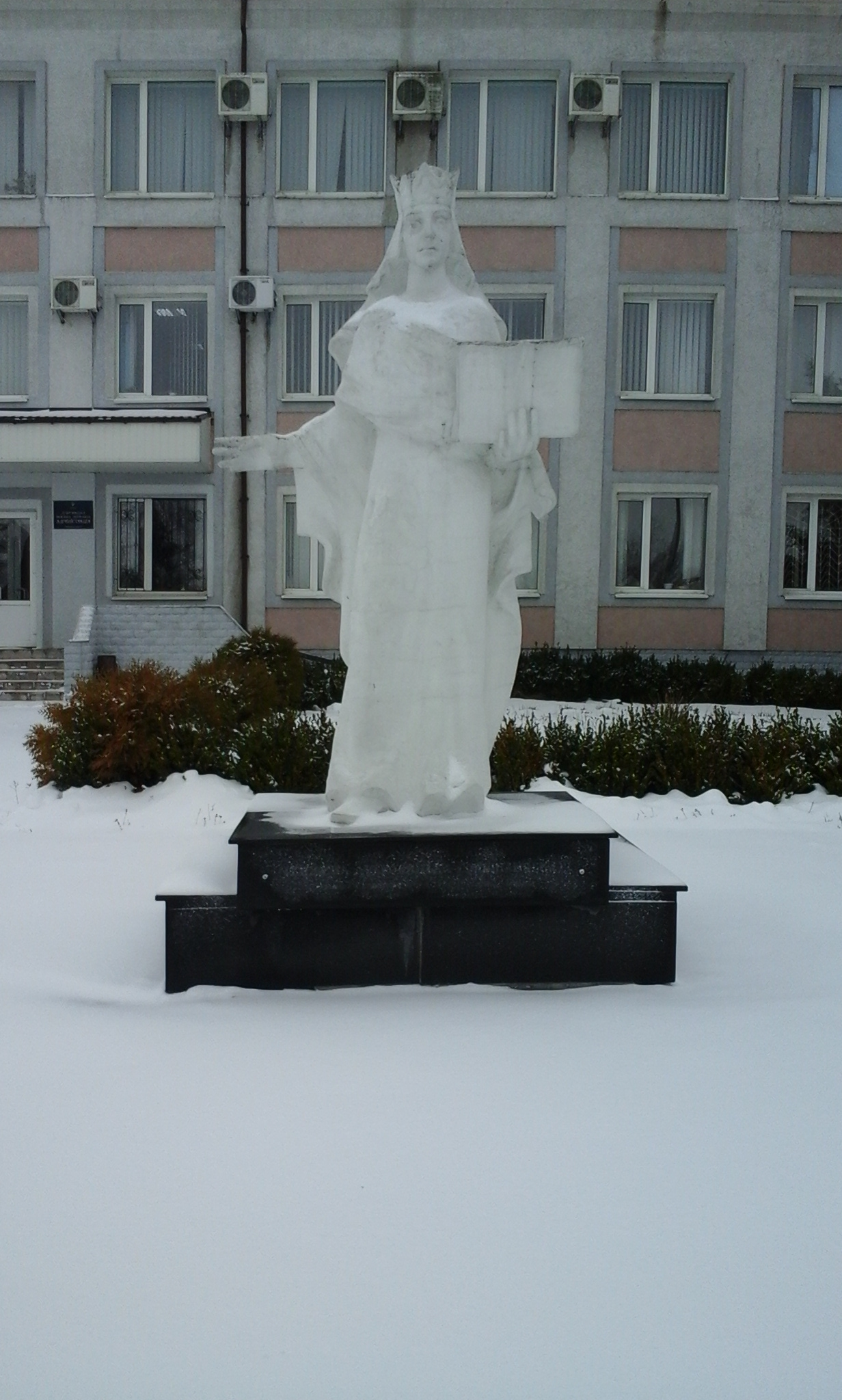 Пам'ятник Анастасії Заславській у м. Дубровиця, Рівненська область, Україна